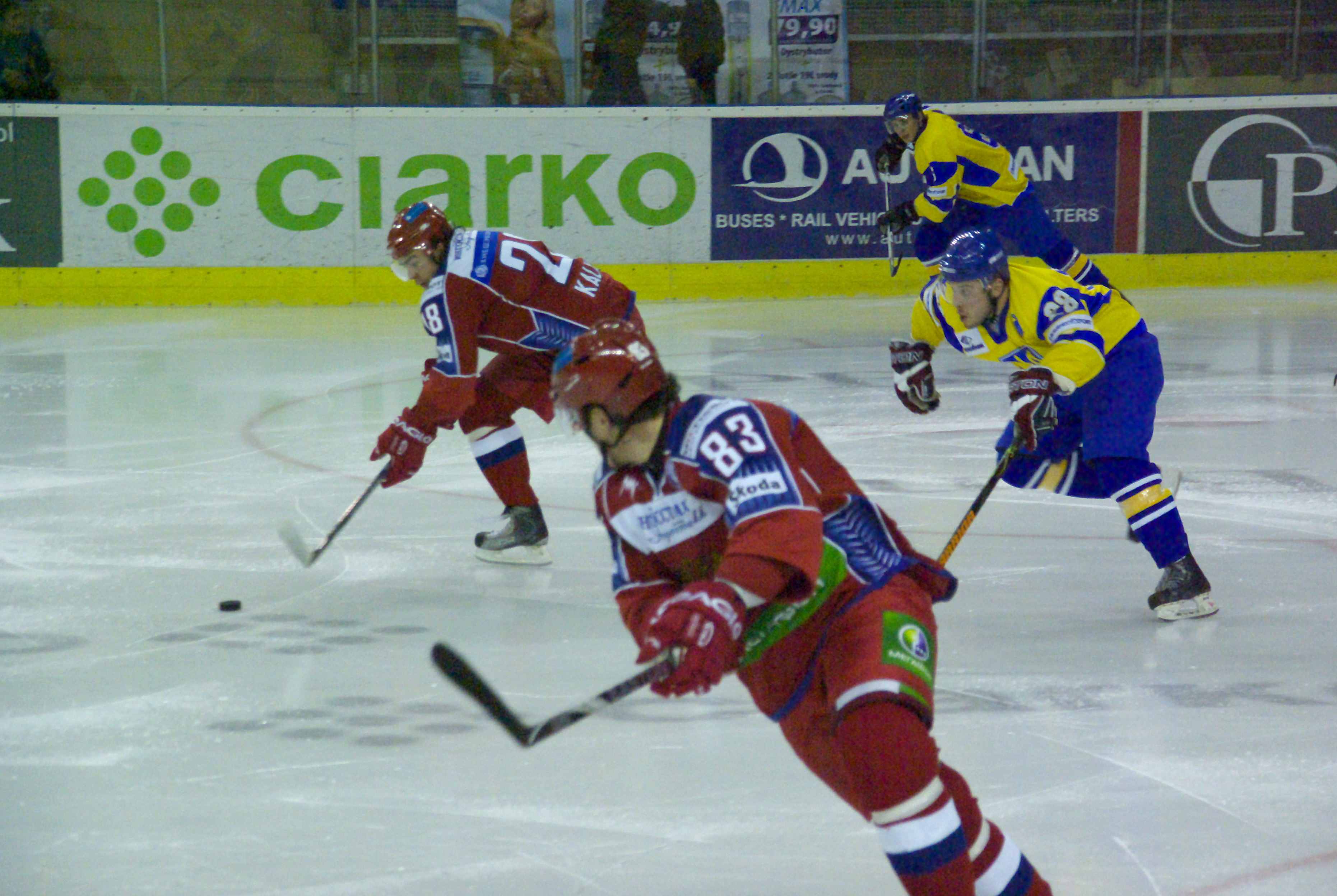 Andiej Kiriuchun #83 oraz Aleksandr Kalianin #28 podczas meczu Rosja B - Ukraina (turniej EIHC w Sanoku)